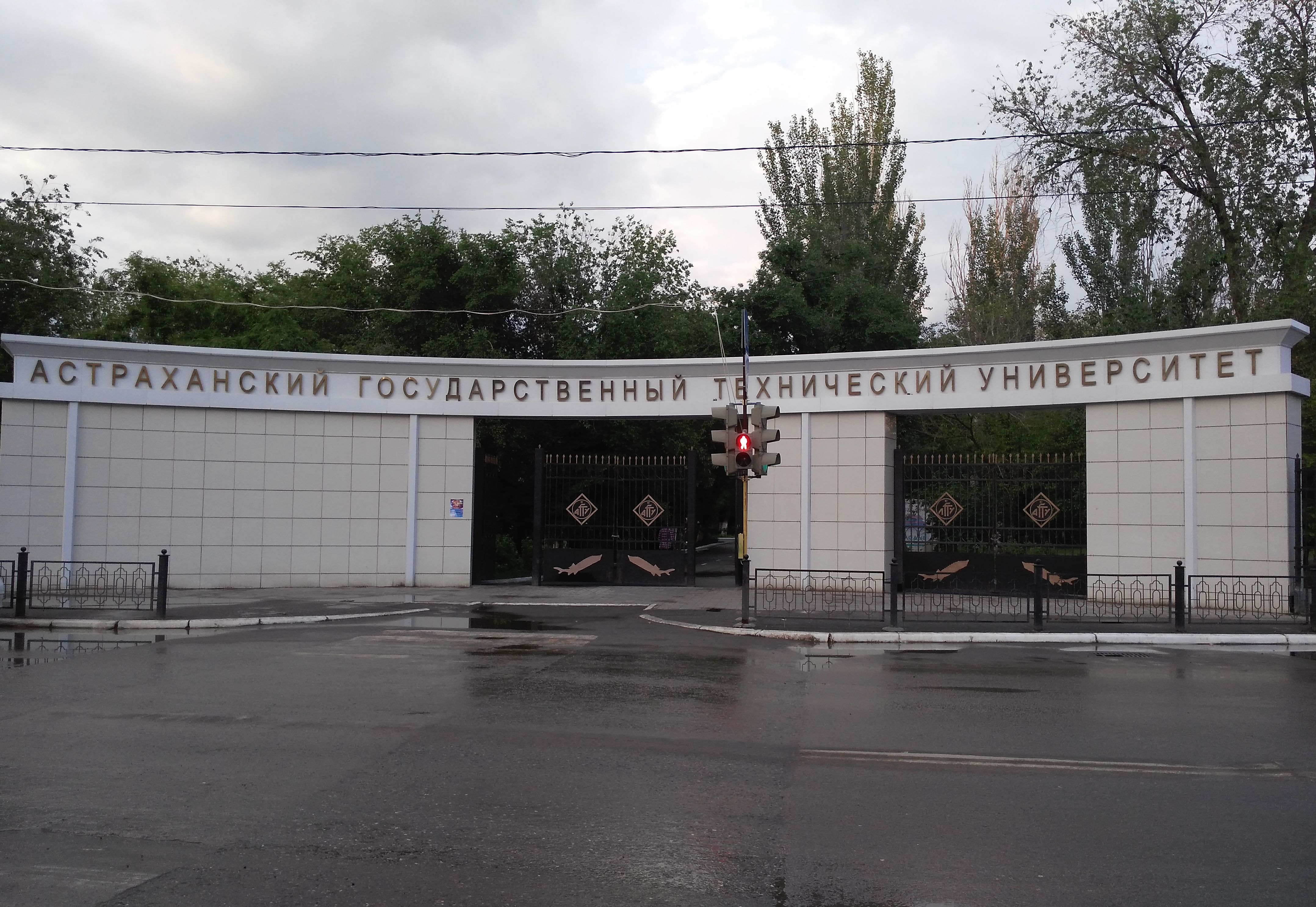 Центральный вход на территорию АГТУ с ул. Татищева